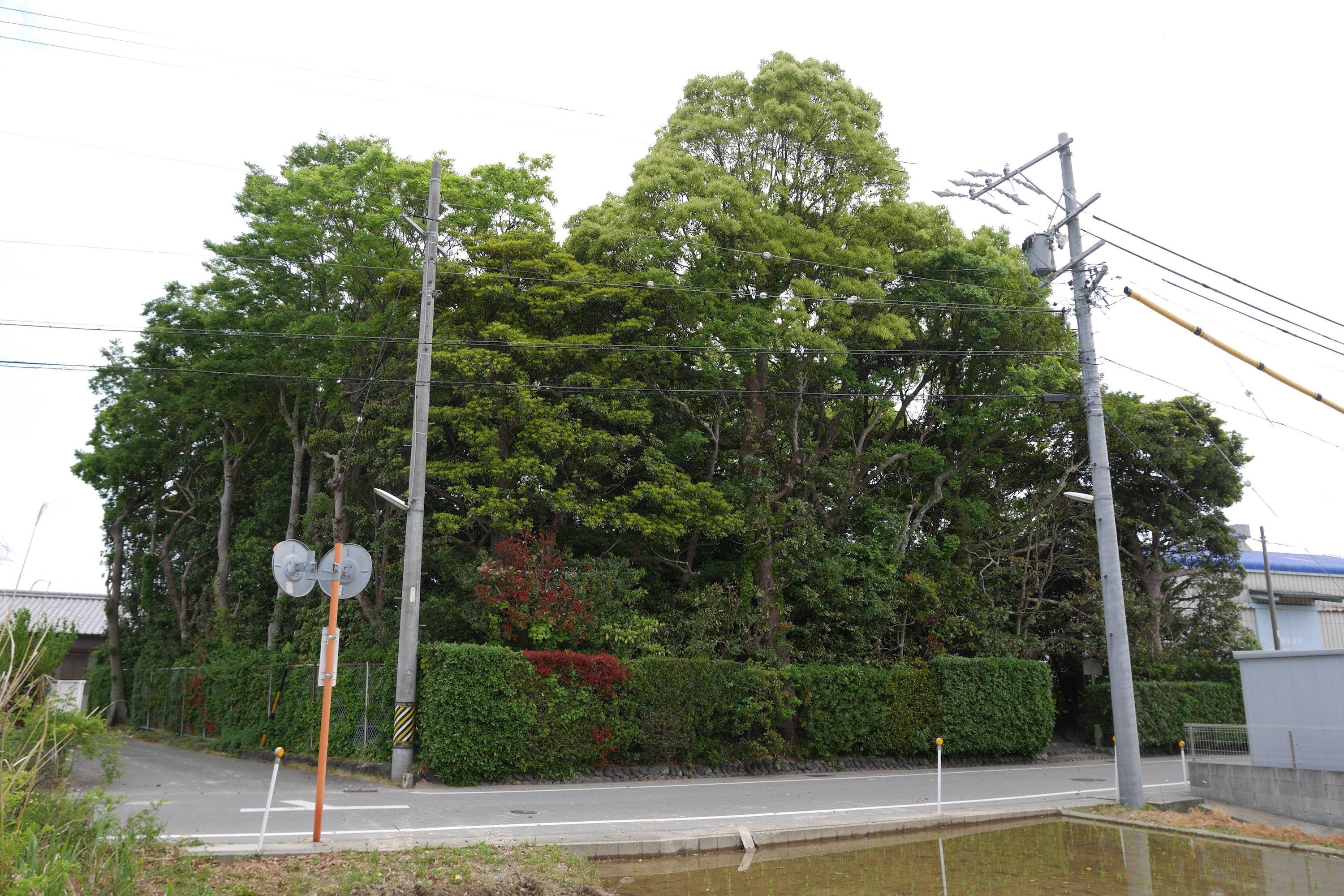 日本の三重県伊勢市御薗町新開にある豊受大神宮摂社の河原神社（かわらじんじゃ）と同座する豊受大神宮末社の毛理神社（もりじんじゃ）の社叢。